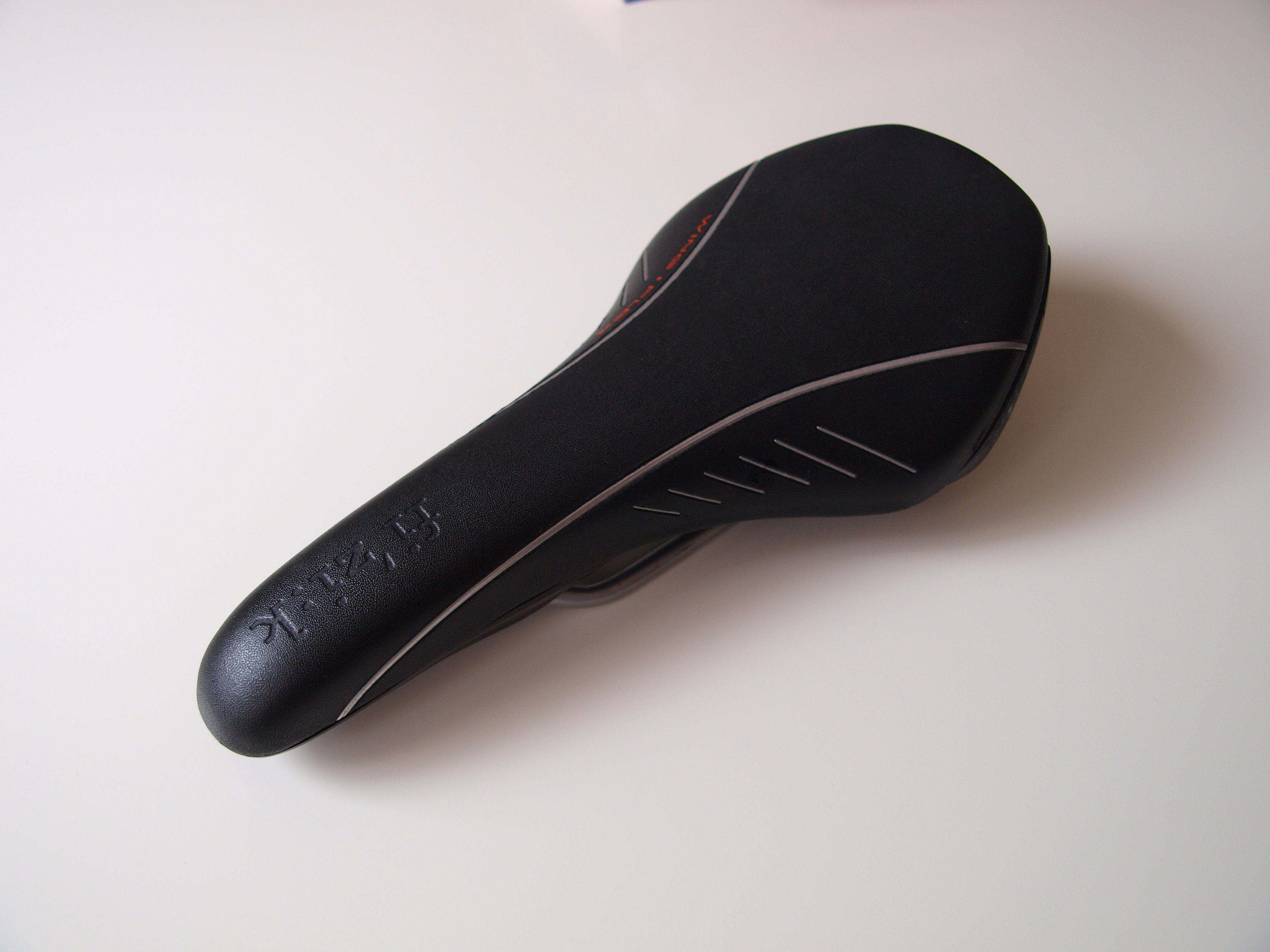 Sport-Fahrradsattel